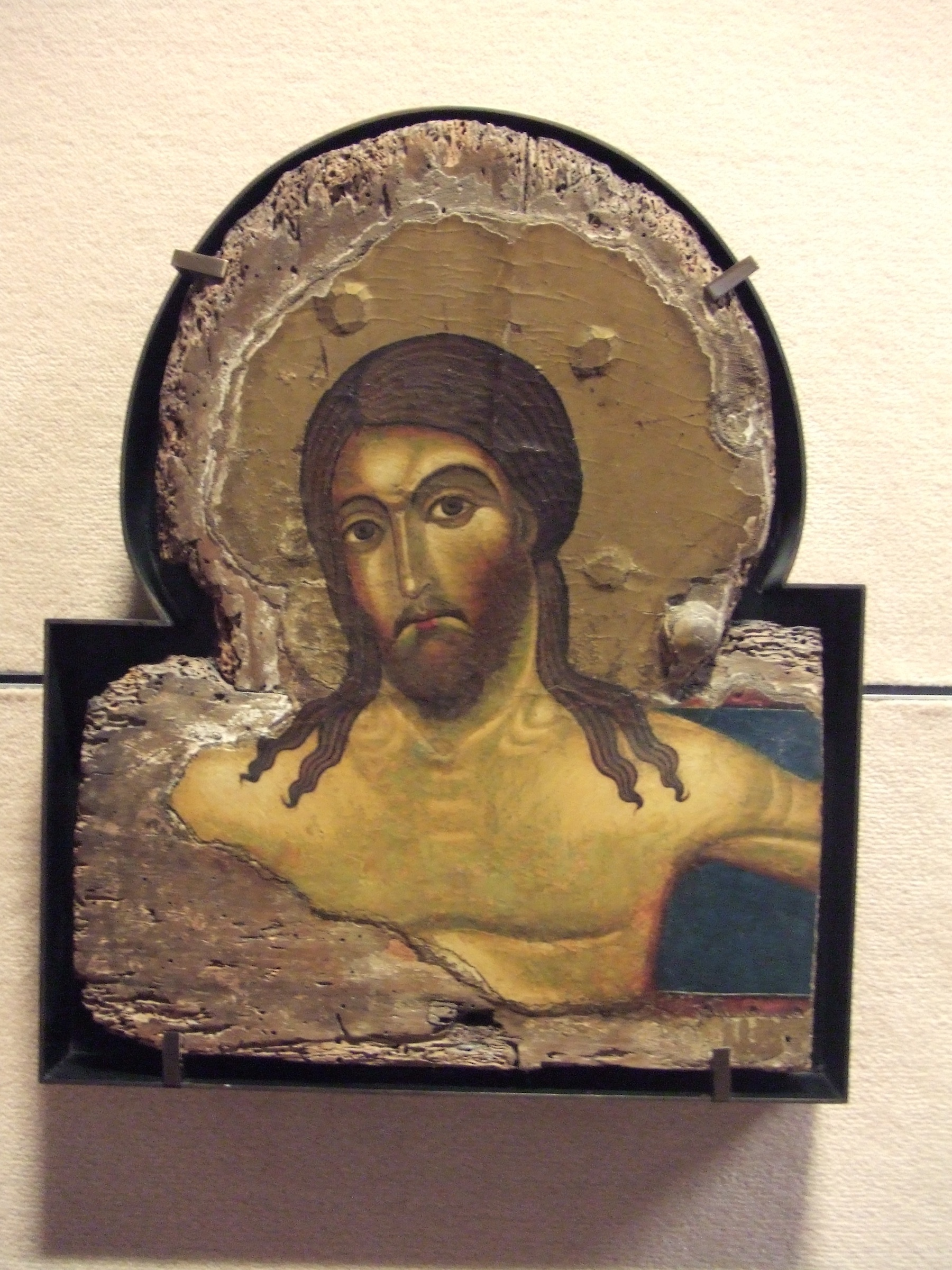 Tête du Christ de croix peinte de l'école des Berlinghieri de Lucques (aussi attribuée récemment au Maître de Calci)- musée du petit palais d'Avignon